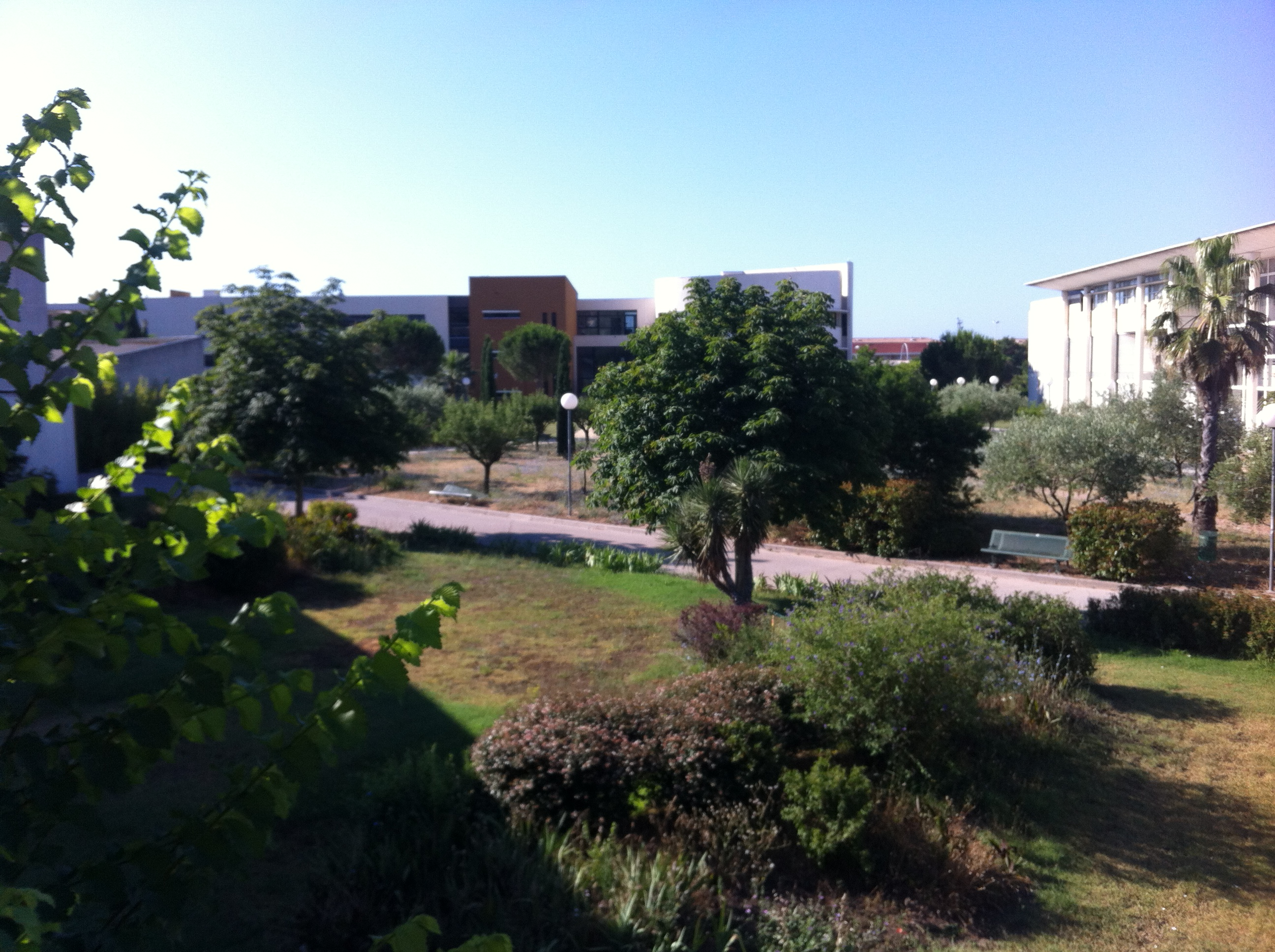 Université de Toulon batiment K